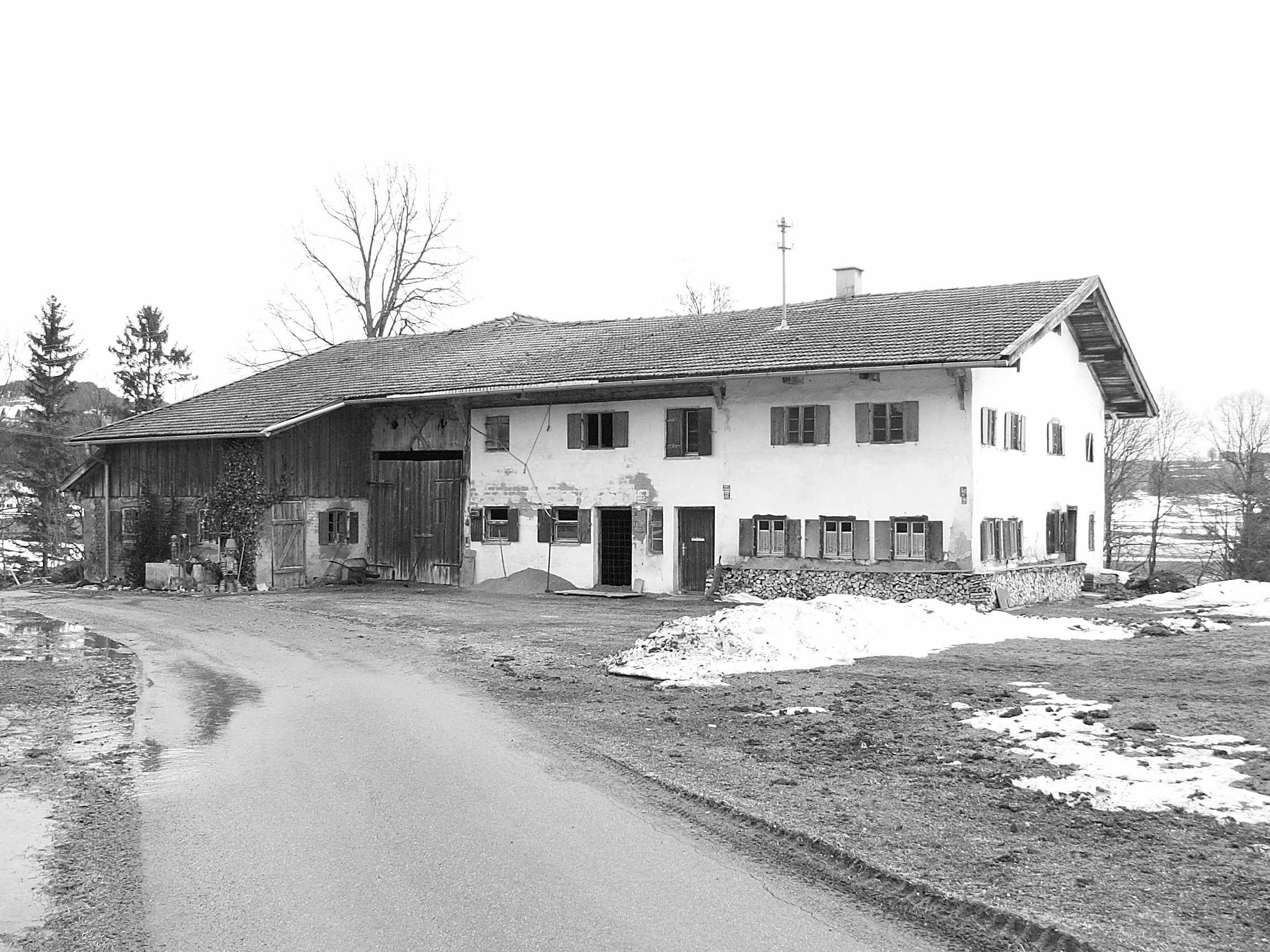 Vogelegg 22, Bernbeuren